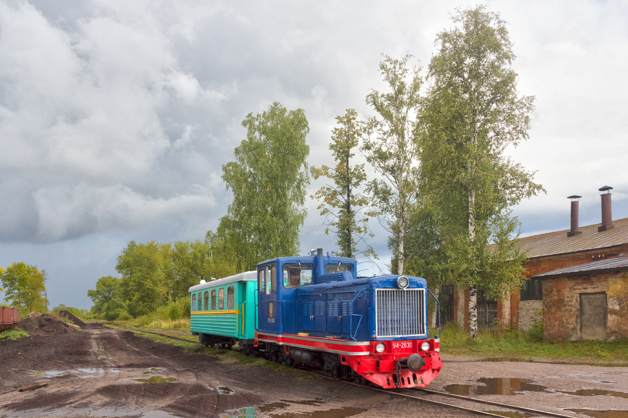 Tiosowska kolej wąskotorowa